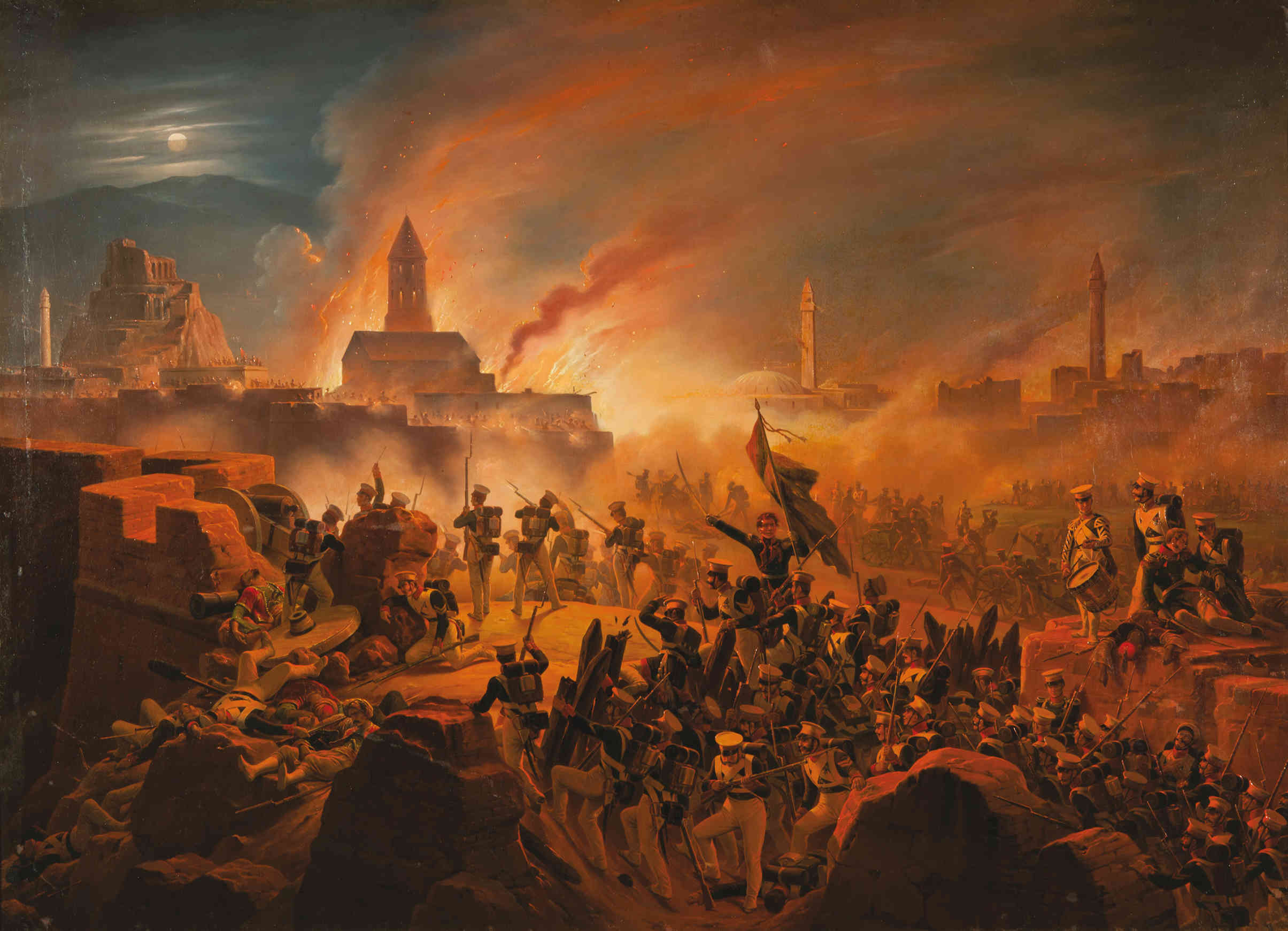 Музей: Гомельскі палацава-паркавы ансамбль Тып: выяўленчыя крыніцы Від: жывапіс Прадметнае імя: жывапіс Назва/аўтарская назва: "Штурм крэпасці Ахалцых" Аўтары: Сухадольскі Януарый (1797-1875); Матэрыялы: палатно; Тэхналогіі стварэння: алей; Дата стварэння: 1837 г. Памеры: 98,5 х 135 см